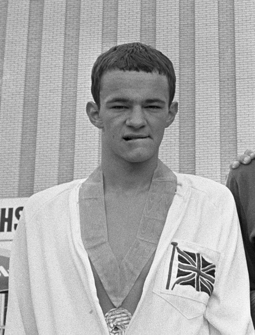 Alan Kimber, European championships